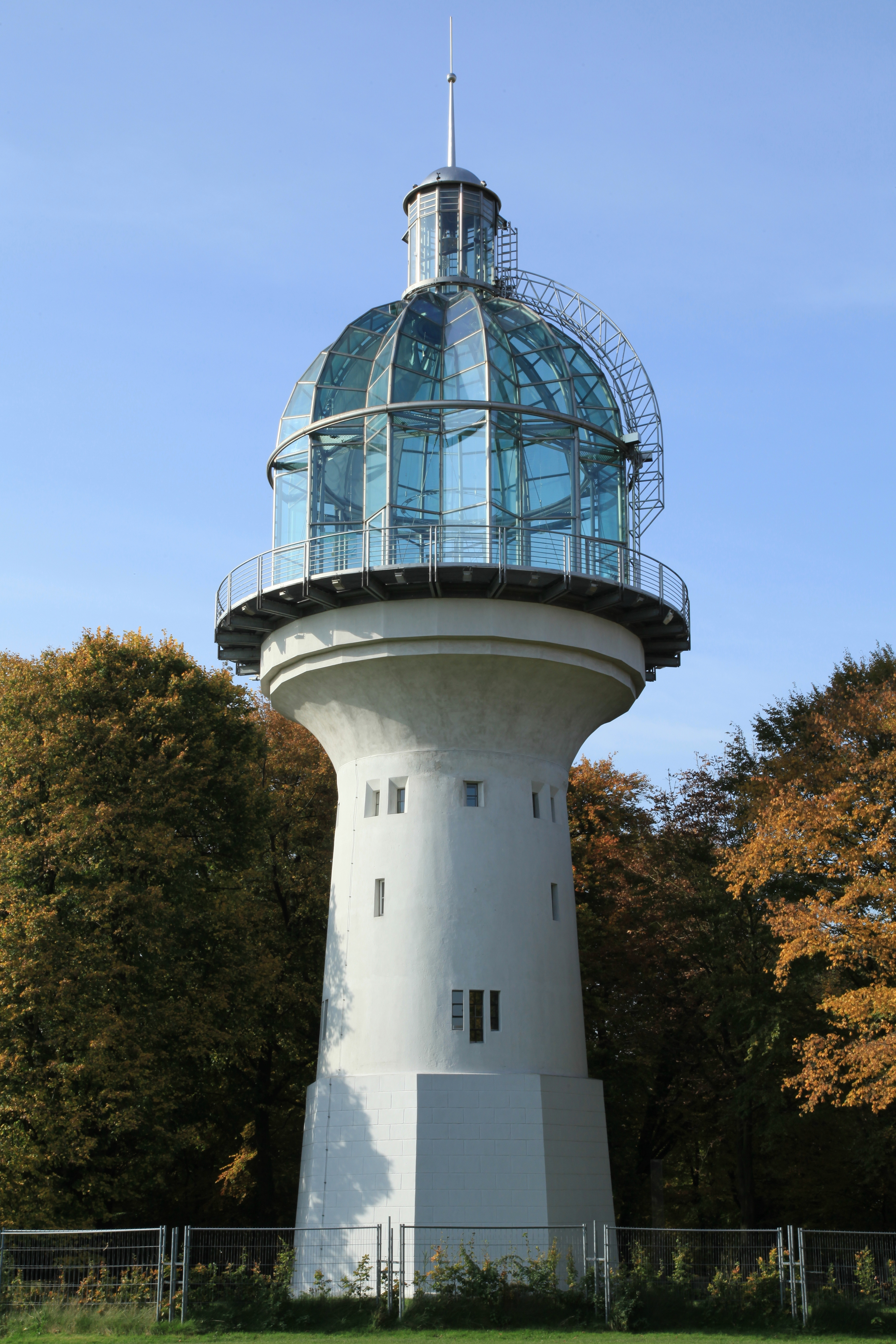 Ehemaliger Wasserturm, jetzt Lichtturm, Lützowstraße in Solingen-Gräfrath